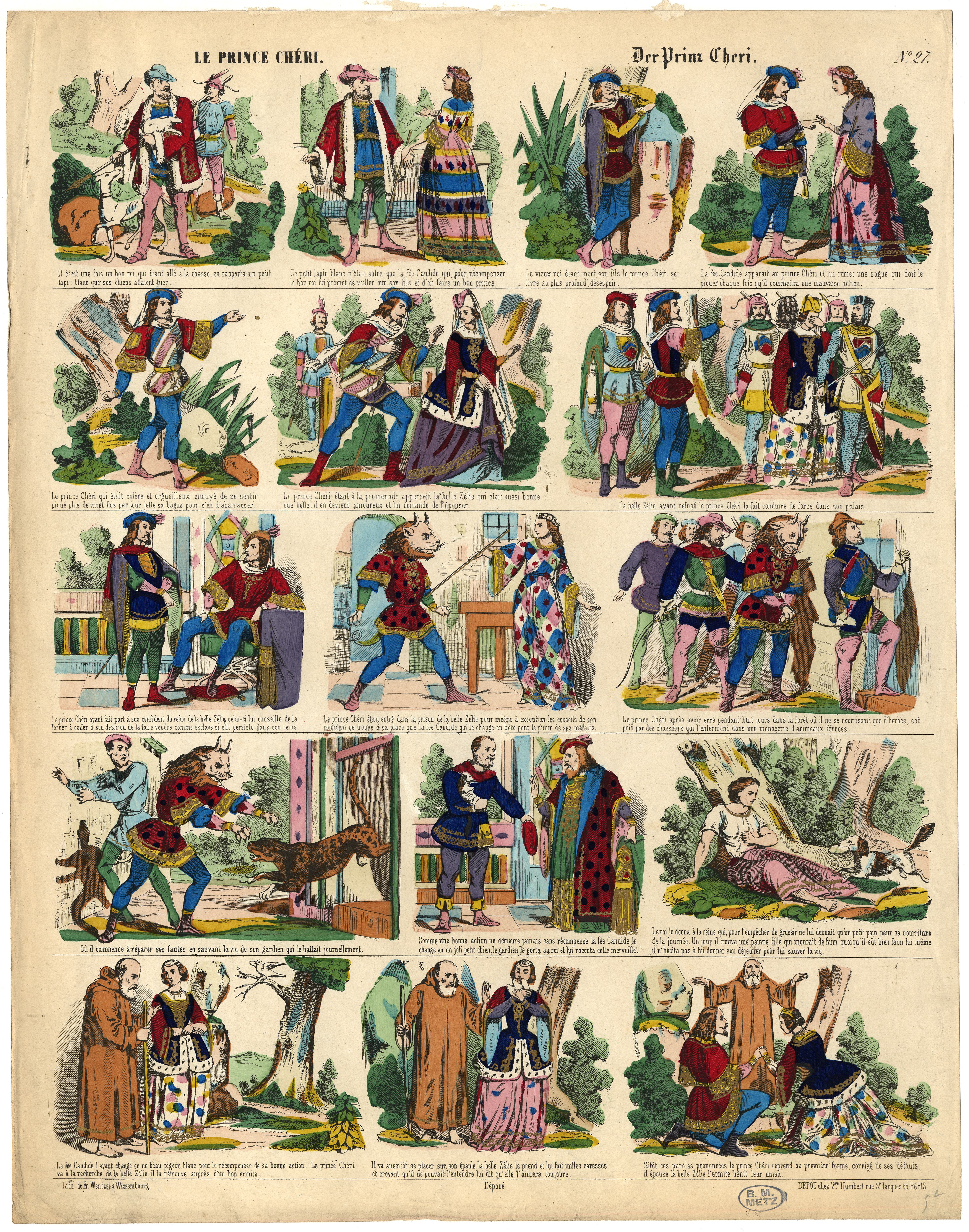 image n°27